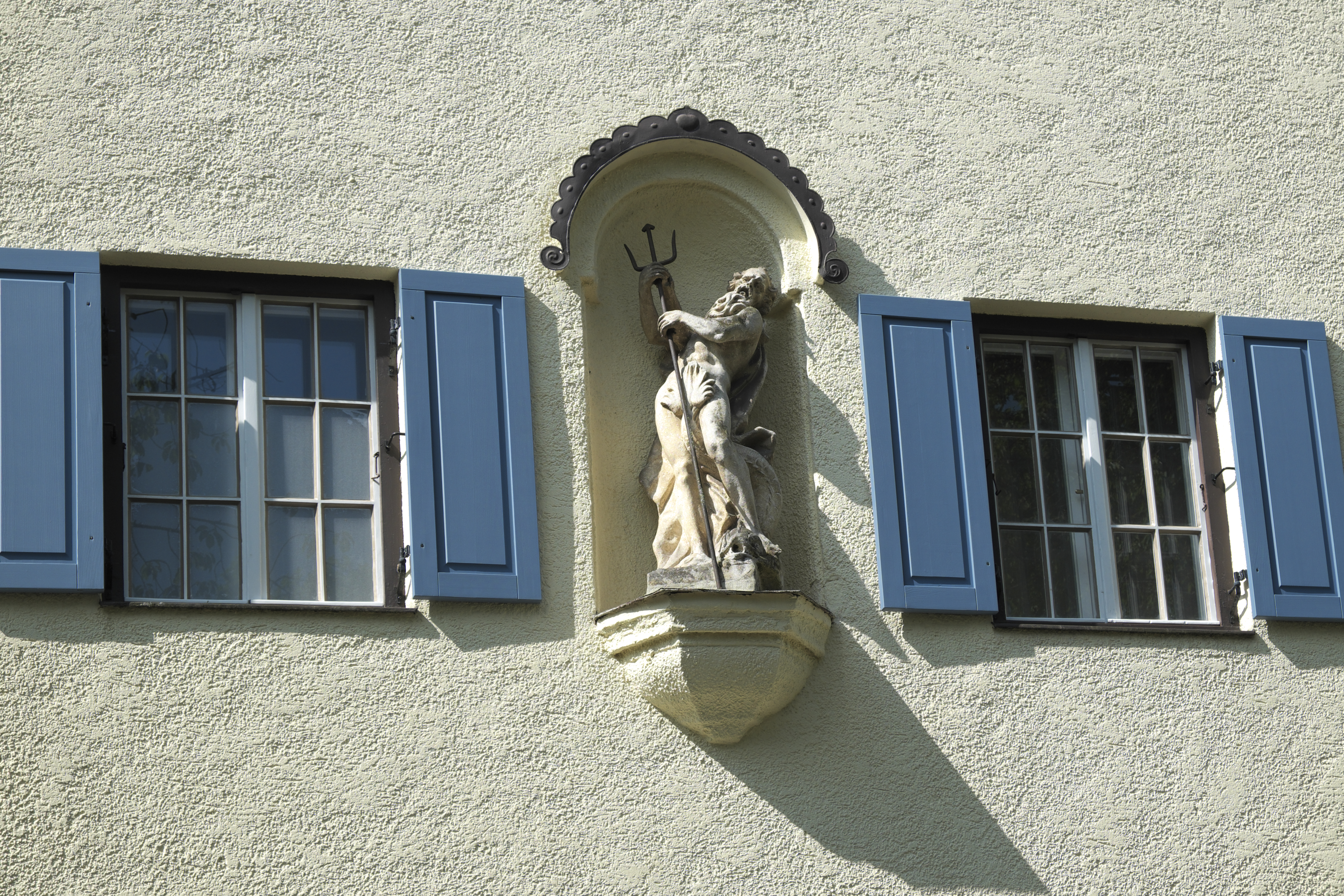 Wohnhaus in der Marschnerstraße 23 in Pasing im Stadtbezirk Pasing-Obermenzing in München (Bayern/Deutschland), 1911 von Edmund Lotterschmid erbaut, mit Neptun-Figur